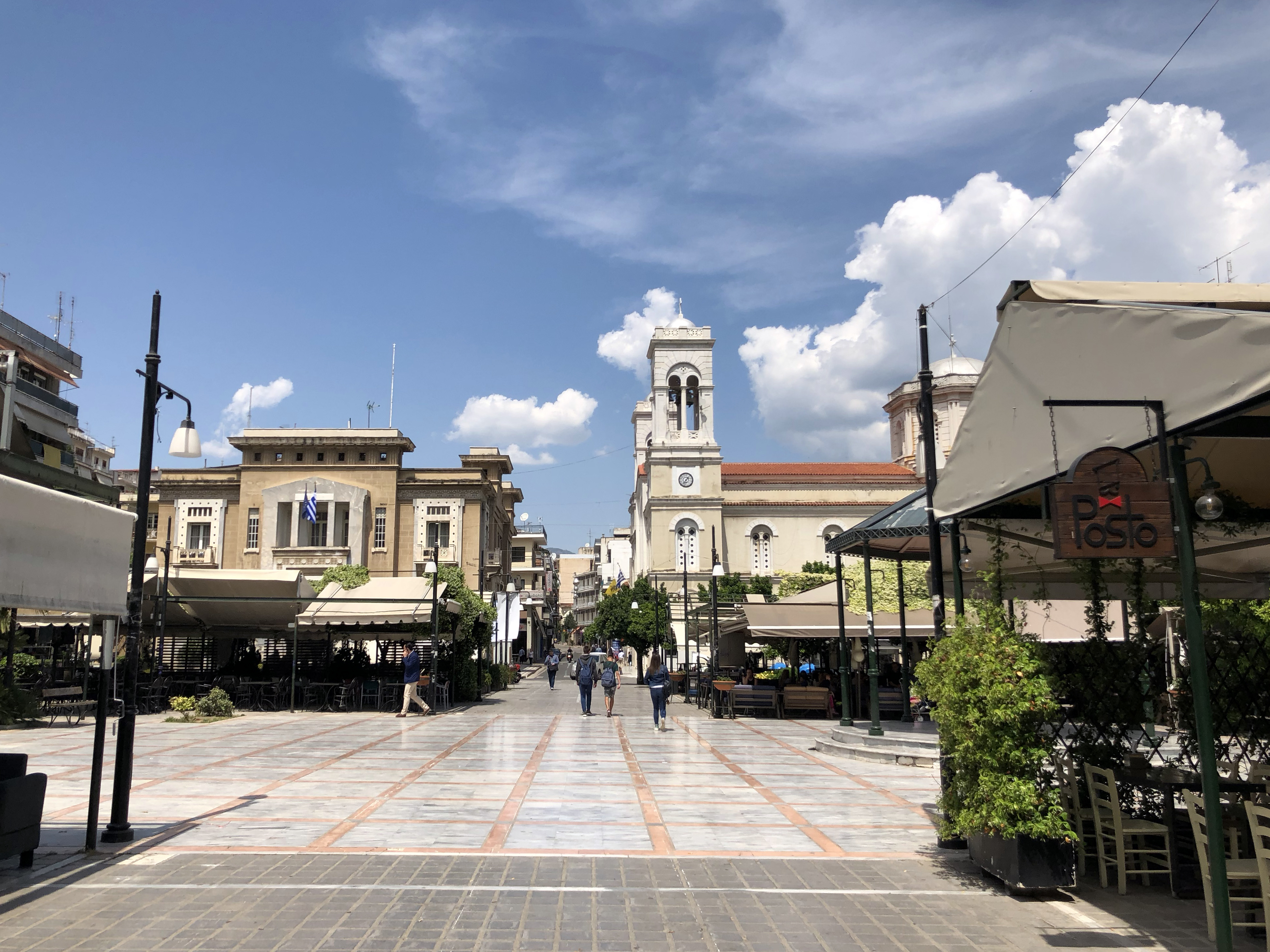 Pl. Eleftherias - Lamia